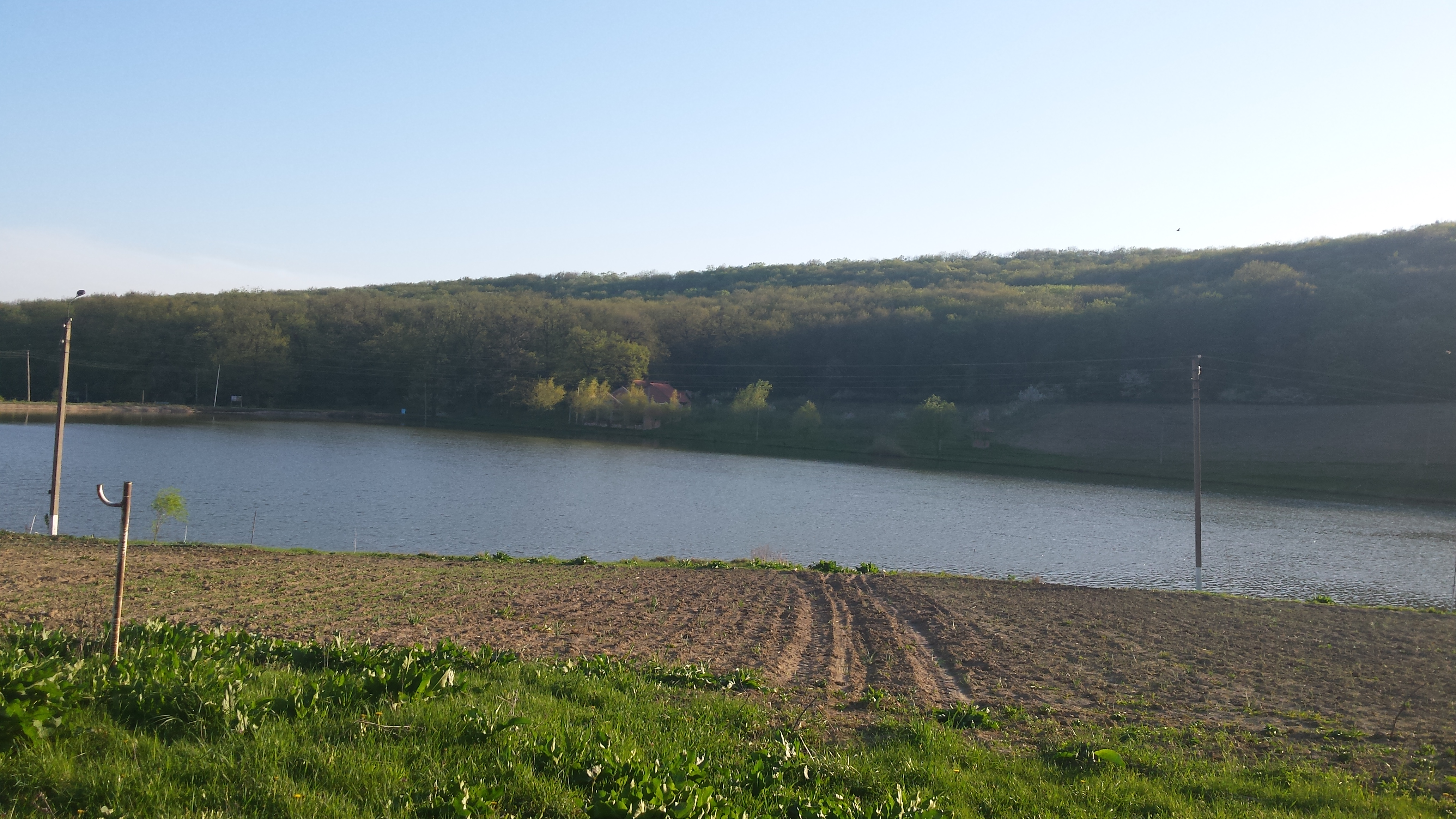 Pădure adiacentă mănăstirii Țigănești (raionul Strășeni, Republica Moldova)